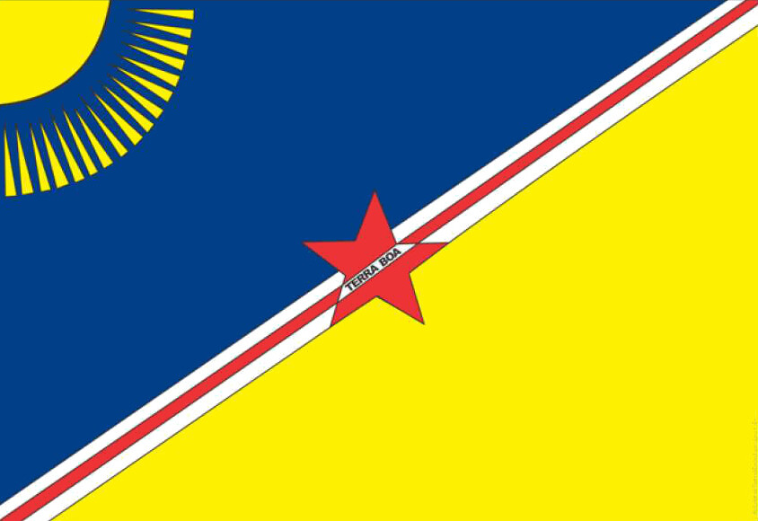 Bandeira do Município de Terra Boa, Estado do Paraná, Brasil.